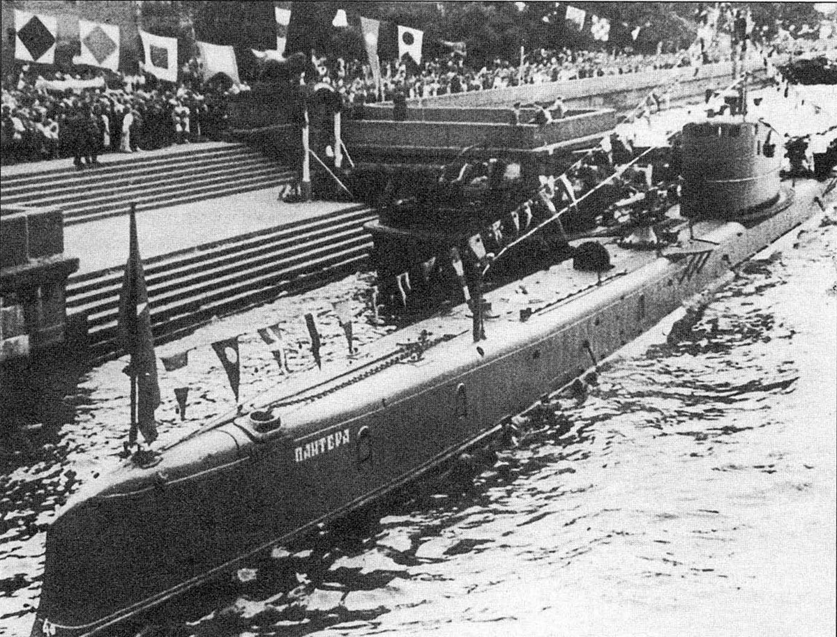 Б-2 после модернизации в Ленинграде